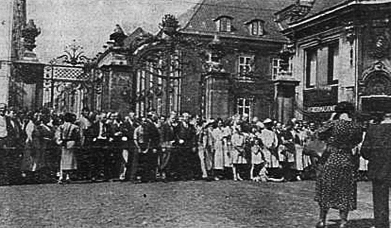 Partoprenantoj de la 19-a SAT-Kongreso en Kopenhago antaŭ la kongresejo, inter la 5-a kaj la 10-a de aŭgusto 1939